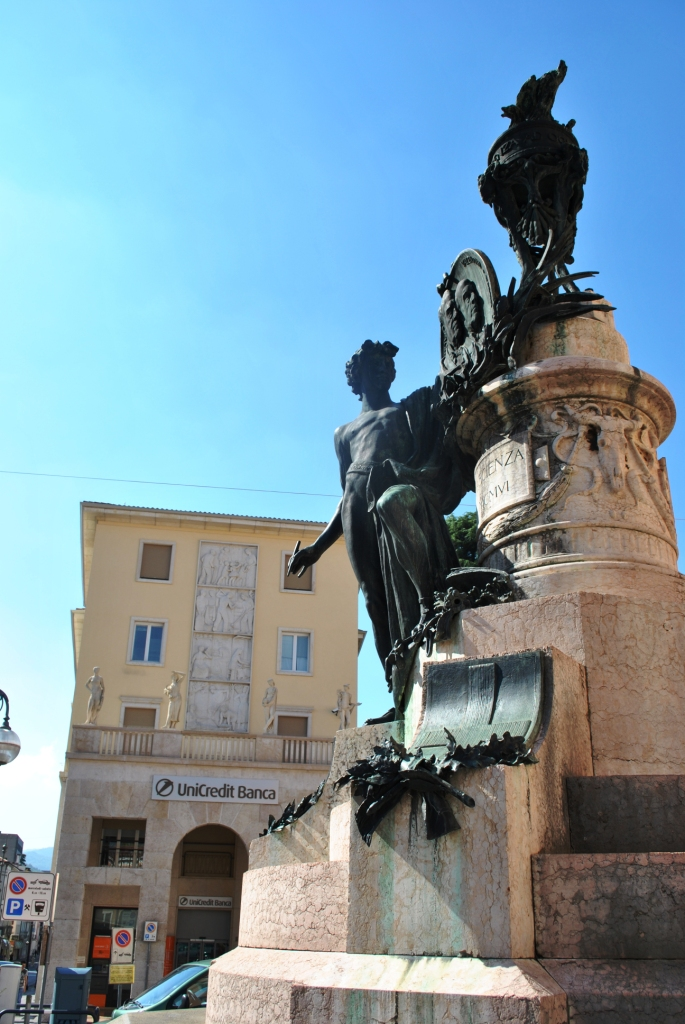 Monumento ai Fratelli Pasini This is a photo of a monument which is part of cultural heritage of Italy.